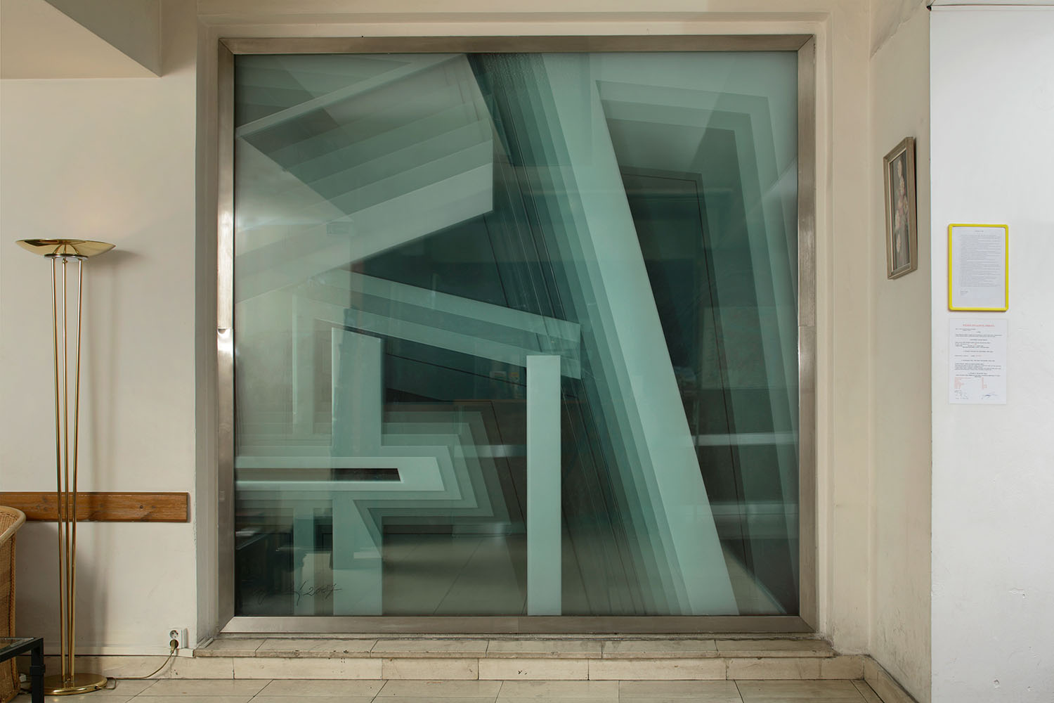 Vladimír Kopecký, Štefánikův dům (hotel Legie), kompozice ze skládaného pískovaného skla, 1989